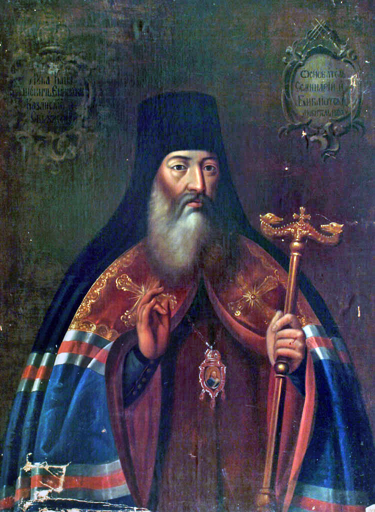 епископ Белгородский и Обоянский Лука (Конашевич)